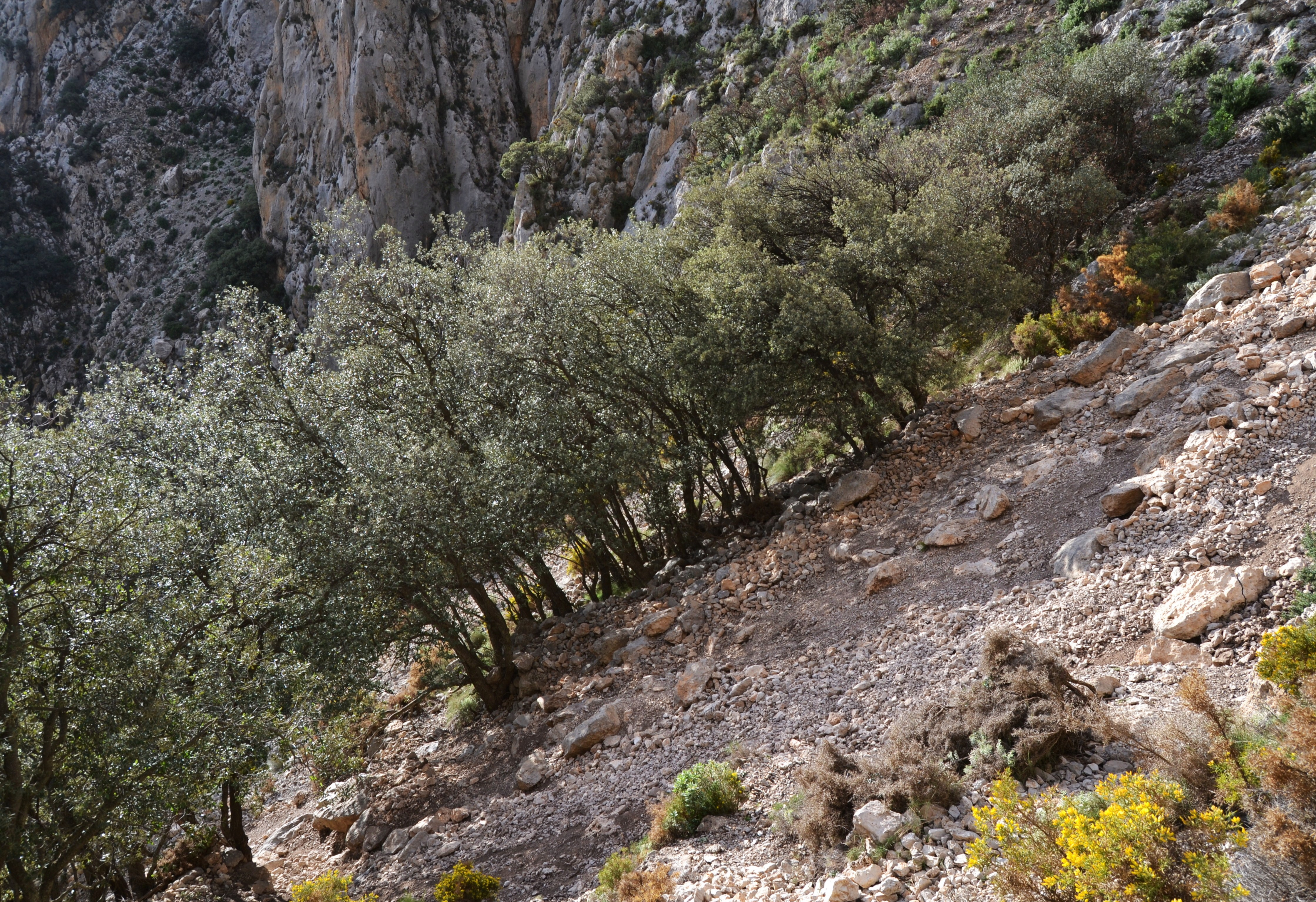 Puig Campana, carrasques al Carreró.